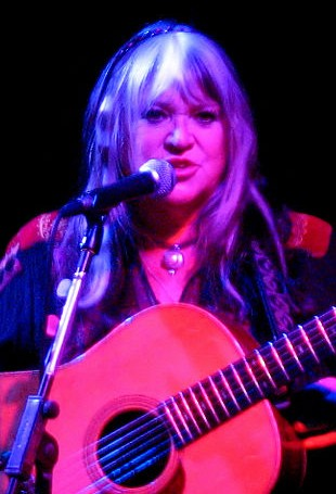 Sängerin Melanie Safka im Metropolis in München 2009